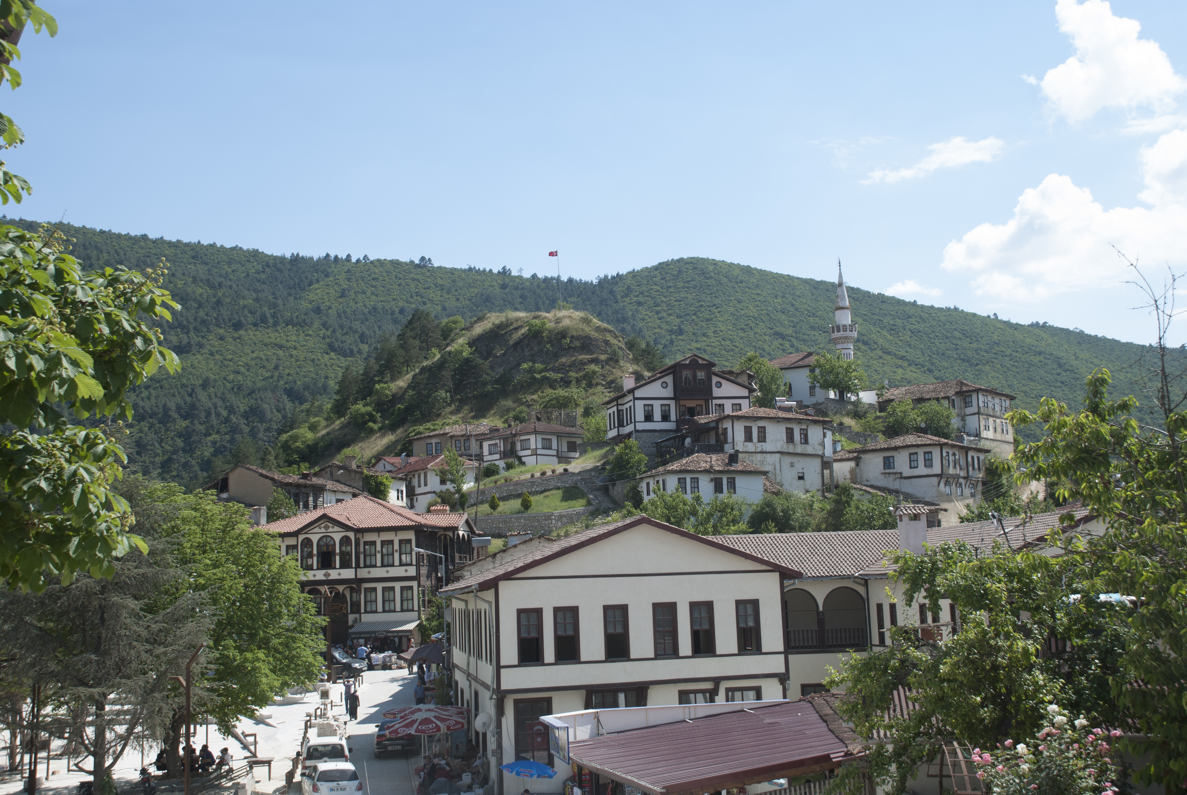 Kalenin bulunduğu, Hisar Tepesi, Taraklı, Sakarya